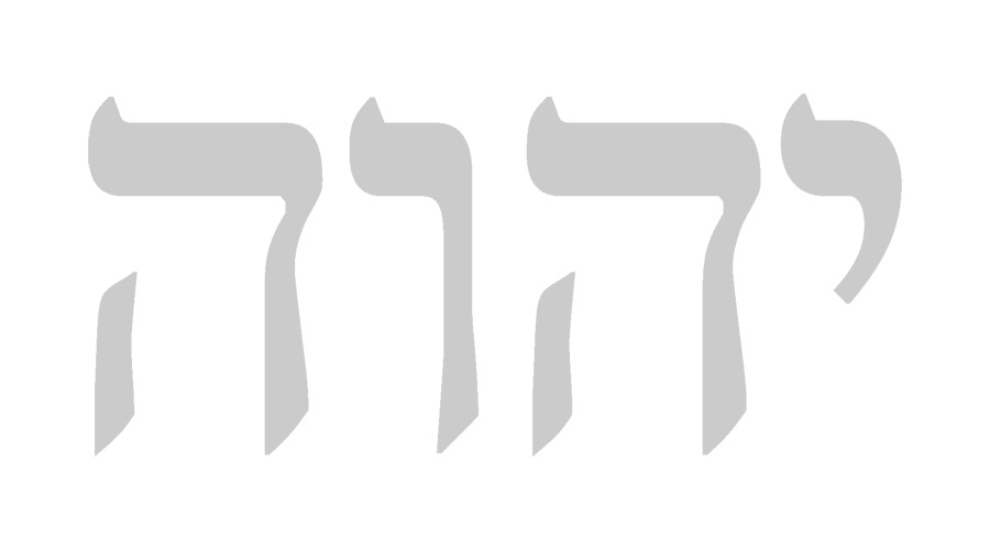 Forma causativa, no imperfeito, do verbo Hebraico ha.wáh (vir a ser; tornar-se); Significado: "Ele Causa que Venha a Ser."